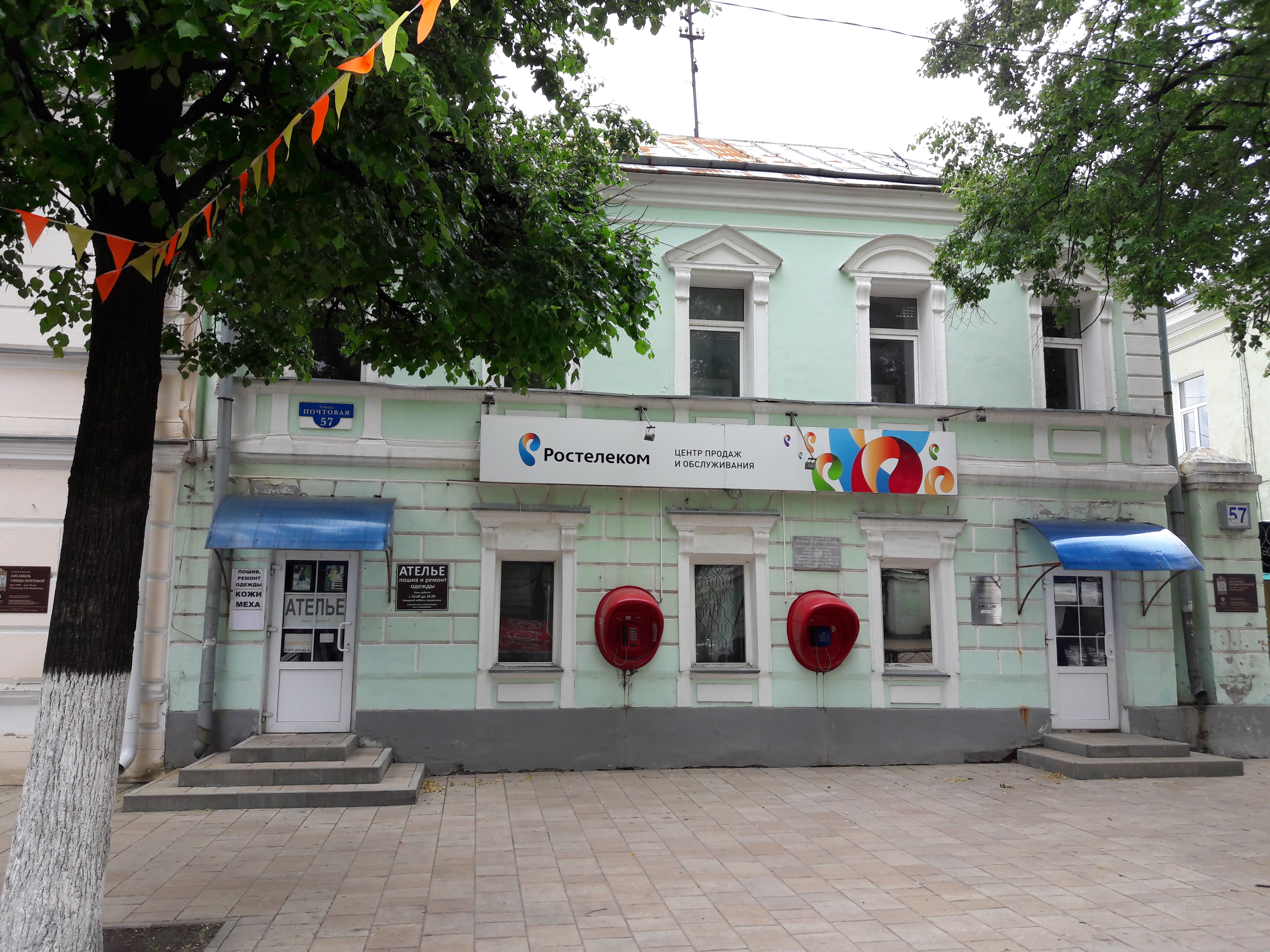 Старое отделение почты в Рязани